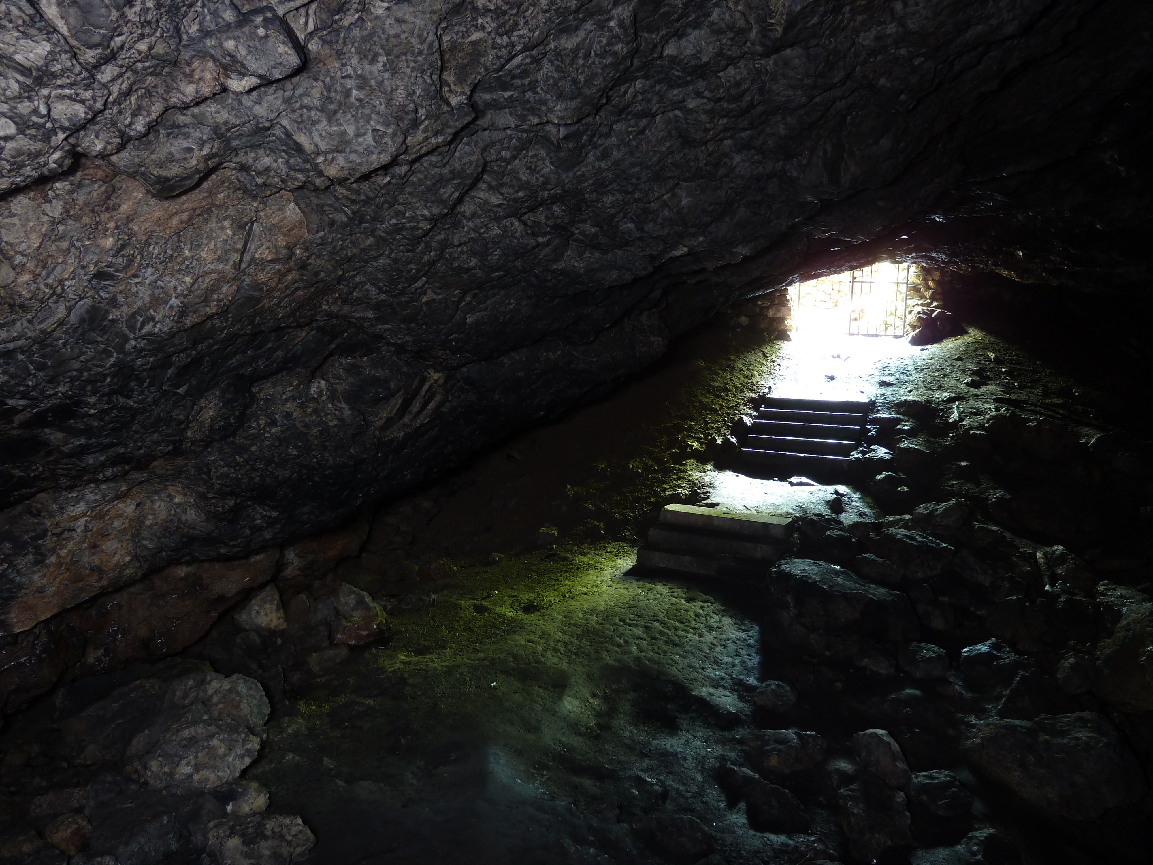 Hohlstein bzw. Hilgershäuser oder Kammerbacher Höhle bei Hilgershausen, Stadt Bad Sooden-Allendorf, Landkreis Eschwege, Hessen. Blick von innen zum Eingang